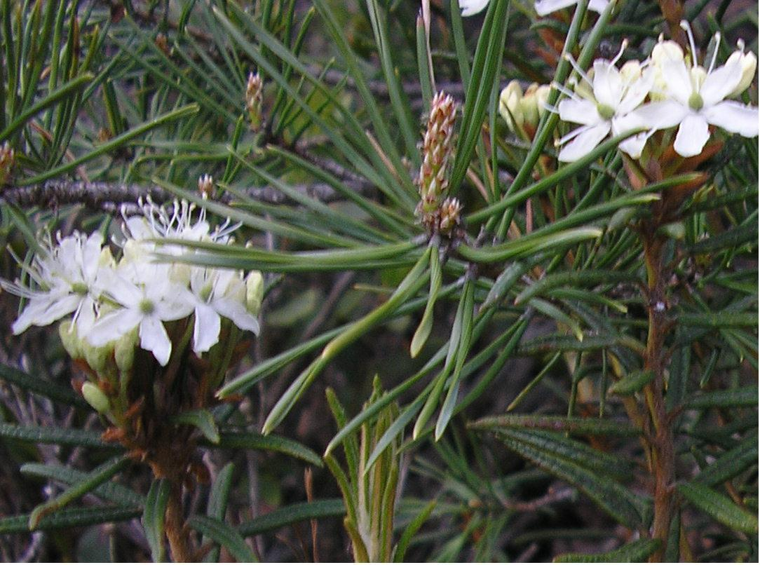 Sookail (Ledum palustre)